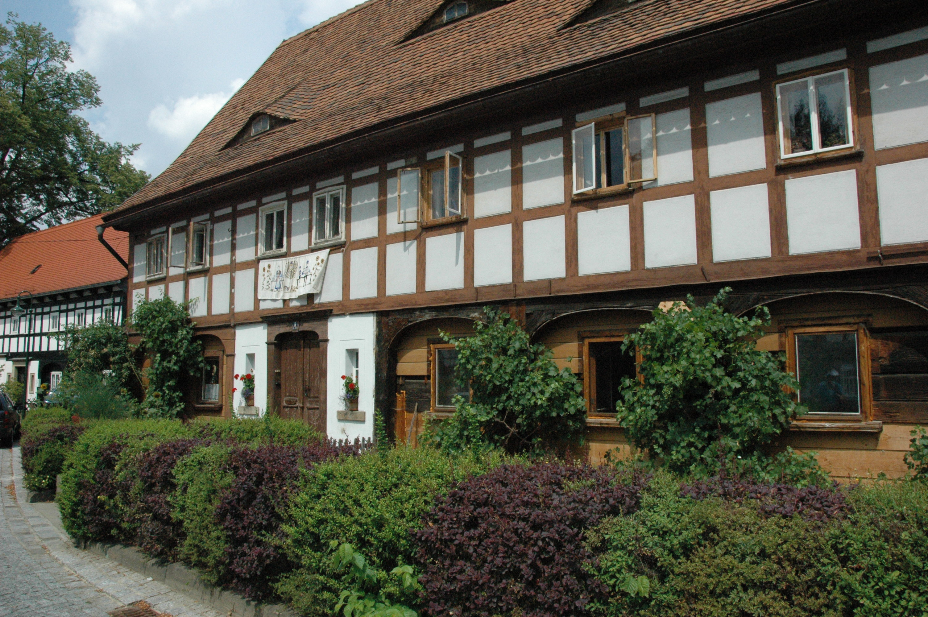 Umgebindehaus in Großschönau (Sachsen)